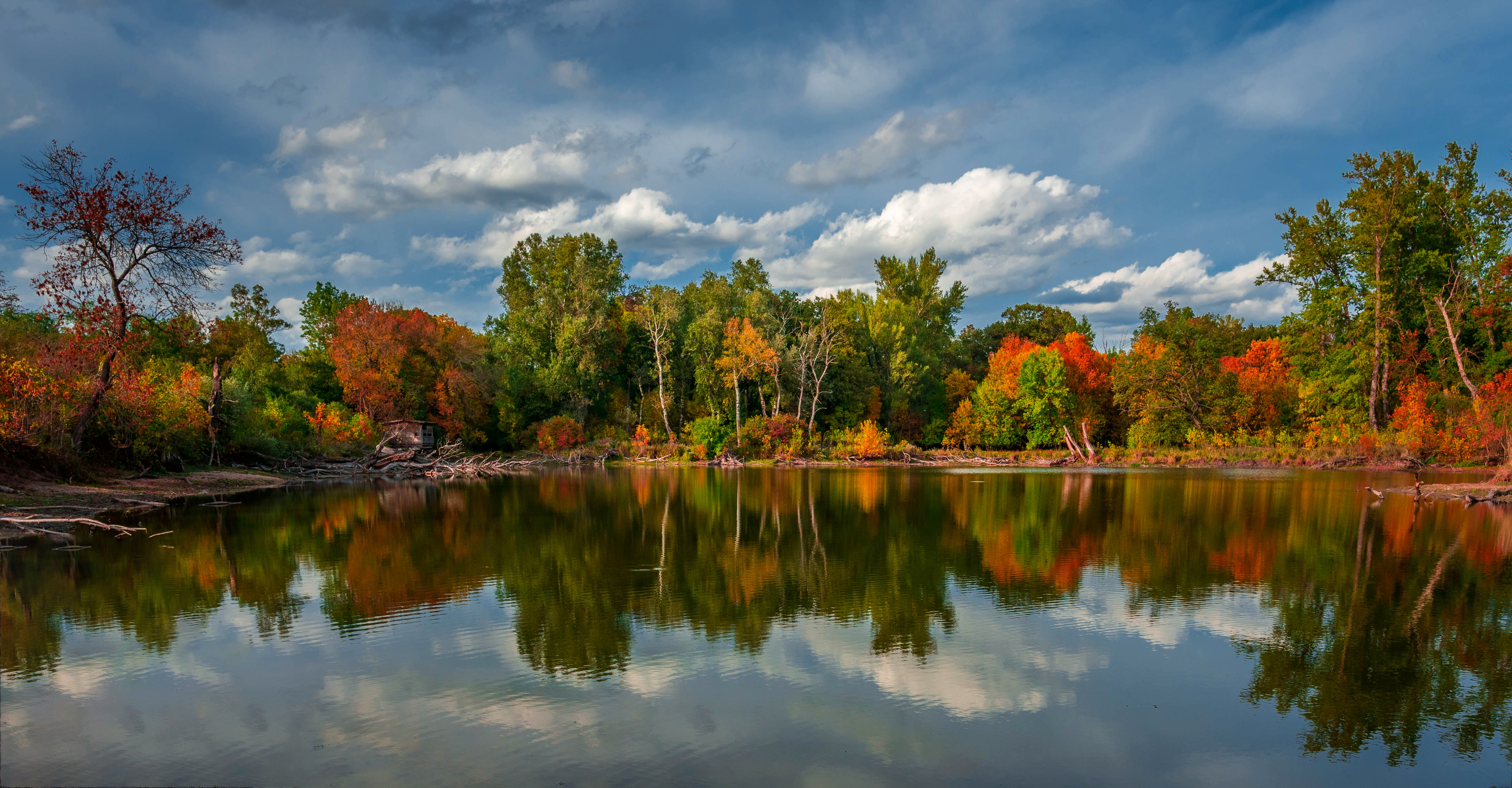 Untere Marchauen; der Biberteich ist z.B. sehr gut geeignet, um viele Vögel, die an das Wasser gebunden sind, zu beobachten. Mit etwas Glück kann man hier z.B. Eisvögeln beim Jagen zusehen. This media shows the nature reserve in Lower Austria with the ID 8.